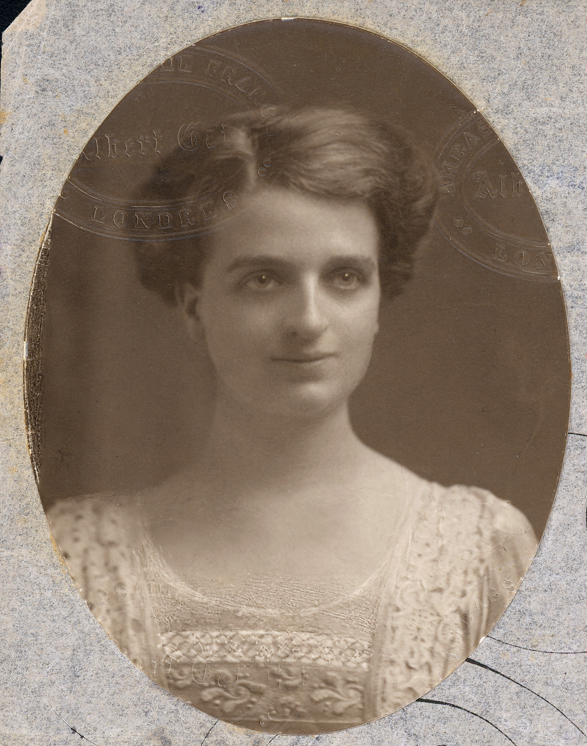 Yseult de Coppet, Ranskan Suomen suurlähettilään Maurice de Coppet'n puoliso (kuva todennäk. noin 1910). Kansalliskirjasto, Coppet'n kokoelma